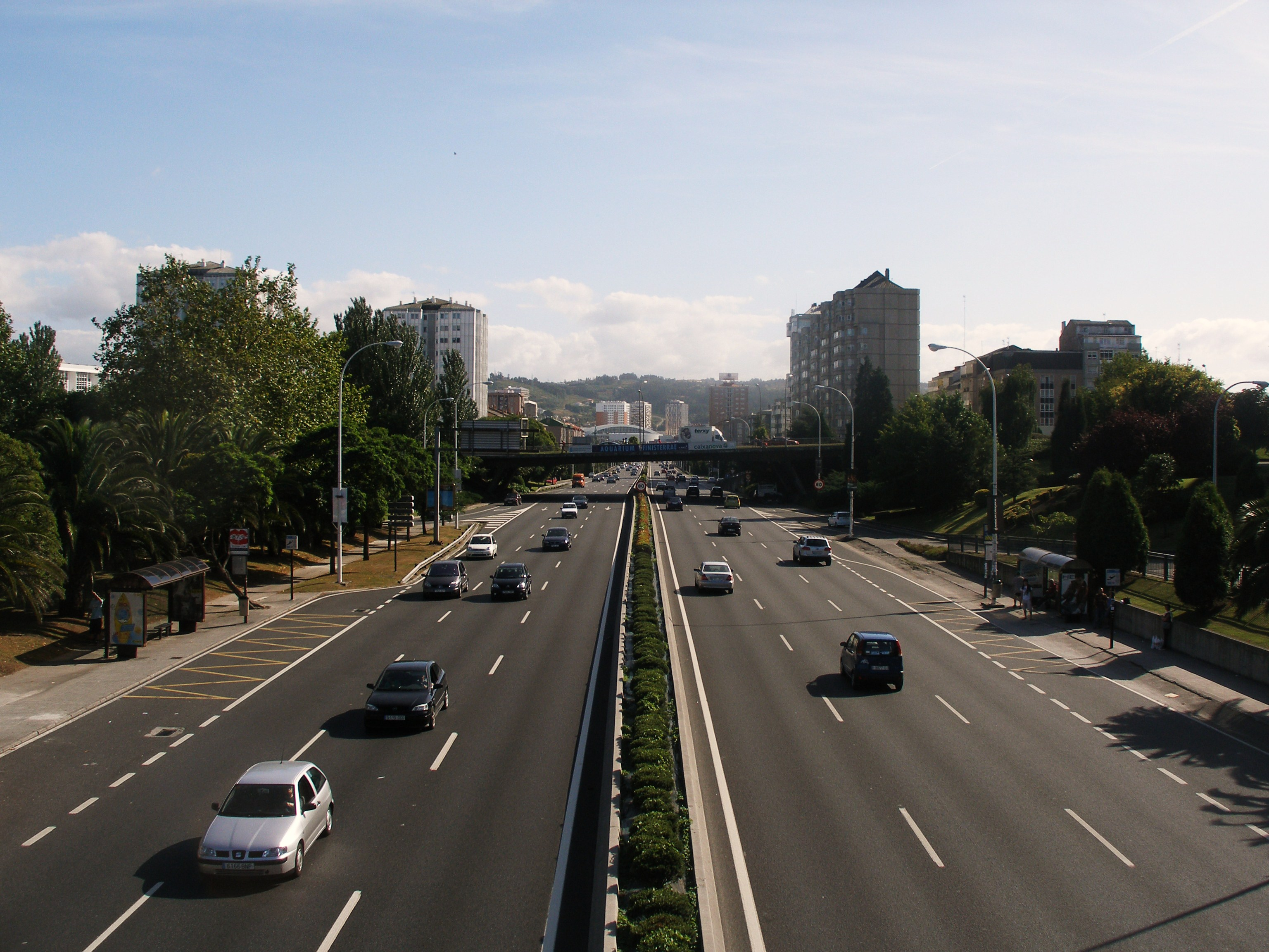 Avenida de Alfonso Molina á altura da Estación de Ferrocarril de San Cristóbal